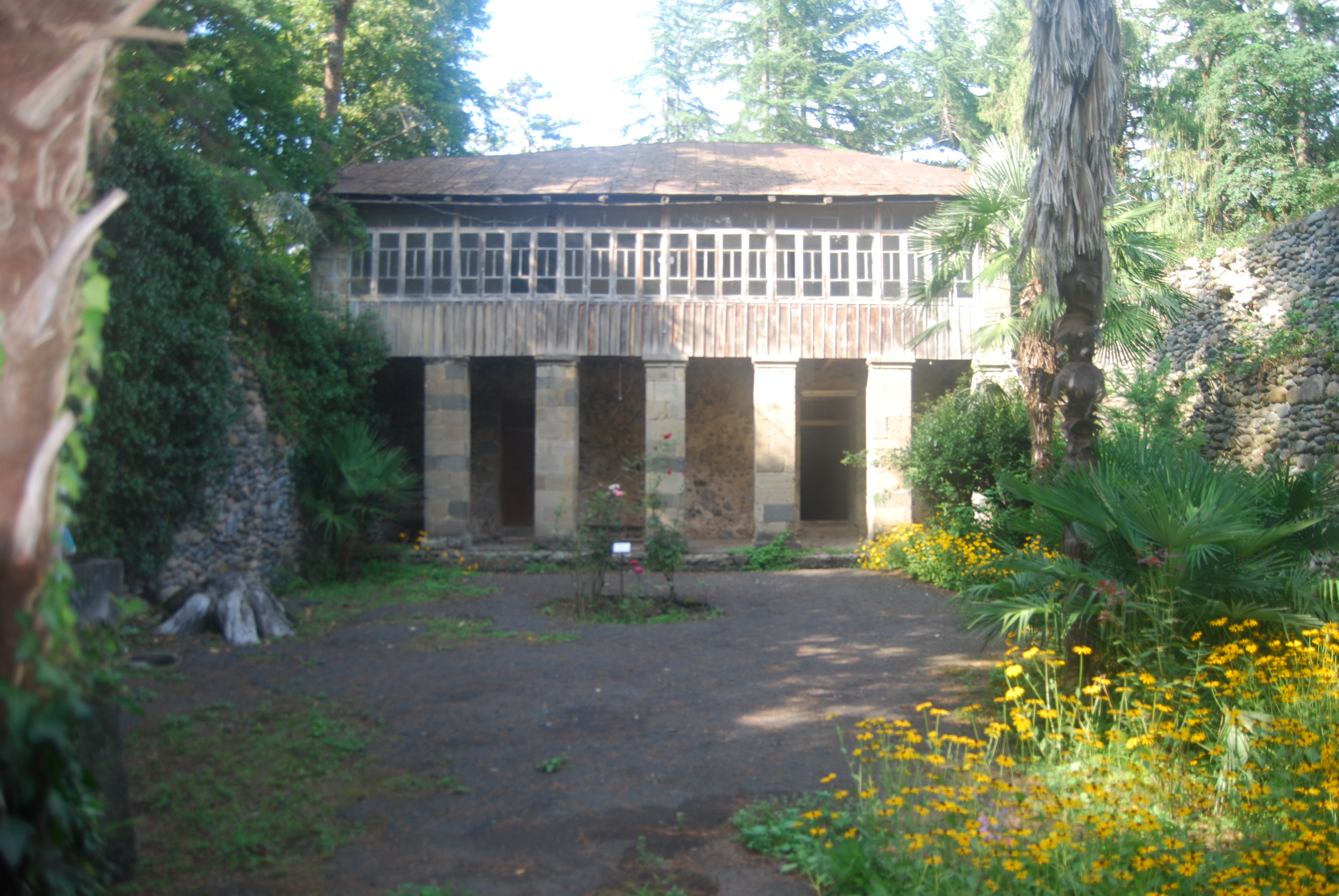 ერისთავების სასახლე, გორაბერეჟოული